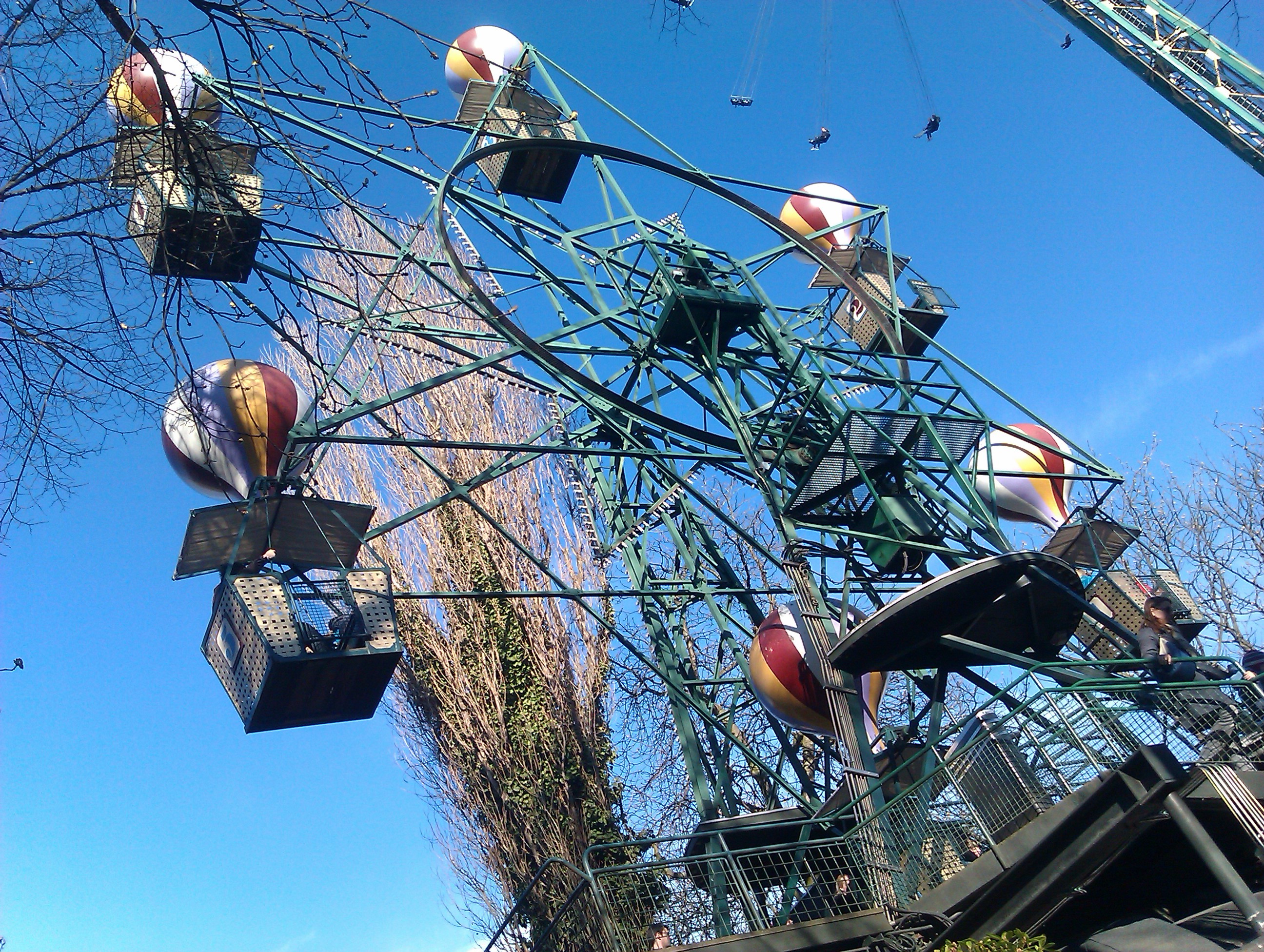 Ballongyngen i Tivoli, København